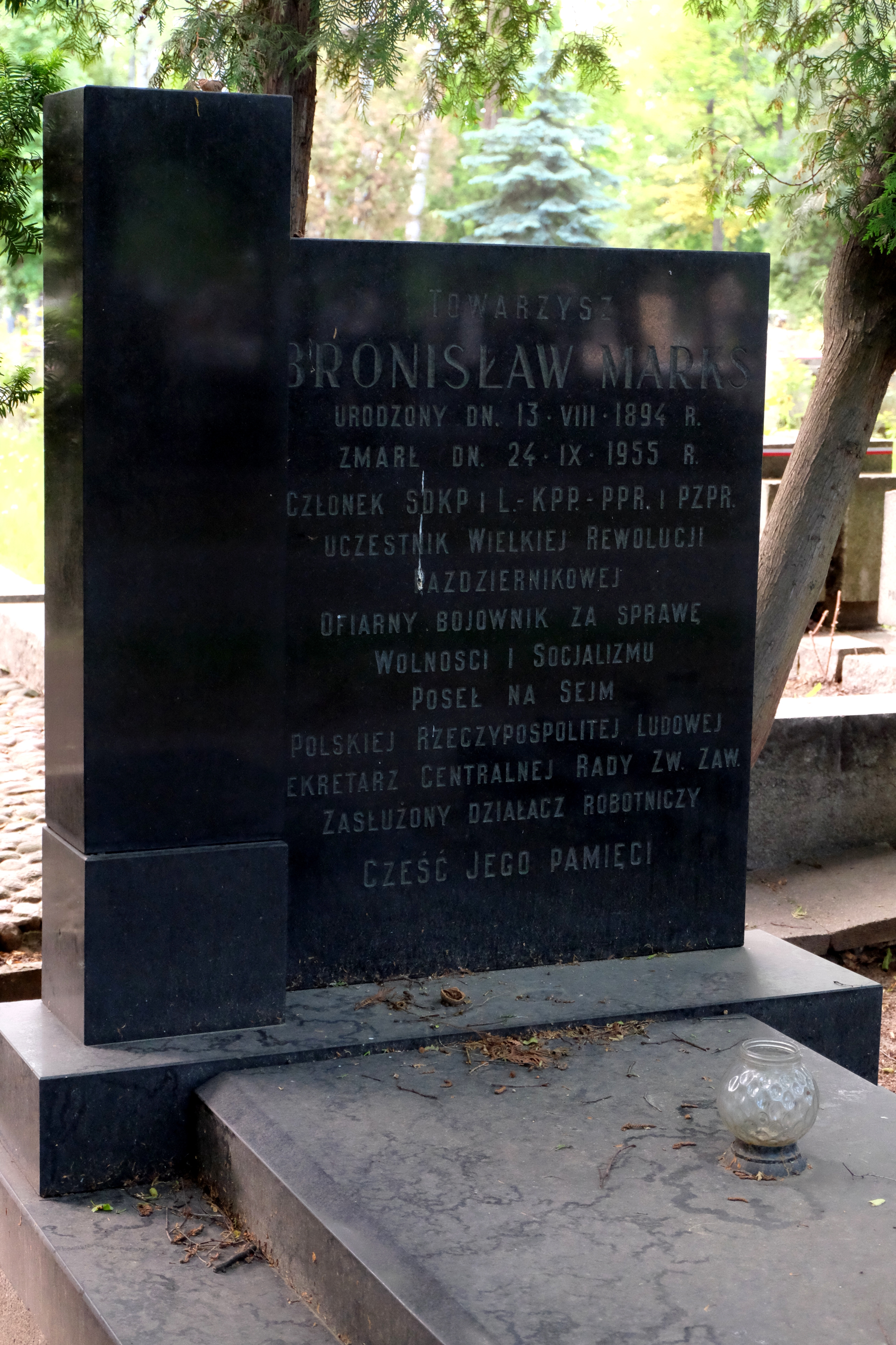 Grób działacza komunistycznego Bronisława Marksa na Cmentarzu Wojskowym na Powązkach w Warszaw